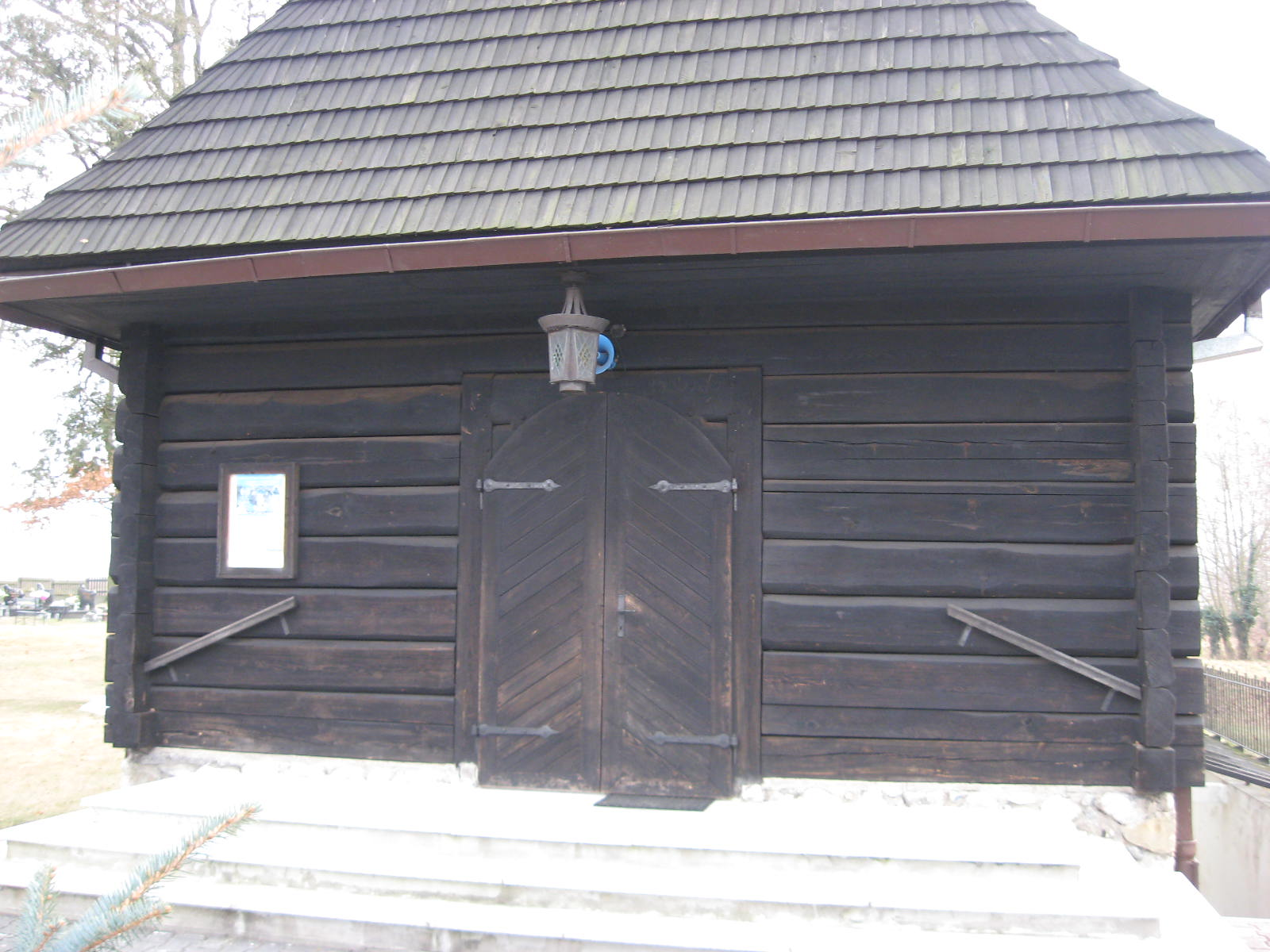 Kościół Podwyższenia Krzyża Świętego w Ligocie Górnej